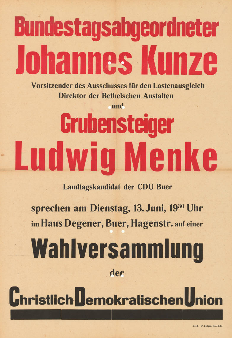 Bundestagsabgeordneter Johannes Kunze Vorsitzender des Ausschusses für den Lastenausgleich Direktor der Bethelschen Anstalten und Grubensteiger Ludwig Menke Landtagskandidat der CDU Buer sprechen ... auf einer Wahlversammlung der Christlich-Demokratischen Union Plakatart: Ankündigungsplakat Drucker_Druckart_Druckort: W. Büttgen, Buer-Erle Objekt-Signatur: 10-009 : 249.30 Bestand: Landtagswahlplakate Nordrhein-Westfalen (10-009) GliederungBestand10-18: Landtagswahlplakate Nordrhein-Westfalen (10-009) » Landtagswahl am 18.6.1950 » CDU » Ankündigungsplakate Lizenz: KAS/ACDP 10-009 : 249.30 CC-BY-SA 3.0 DE